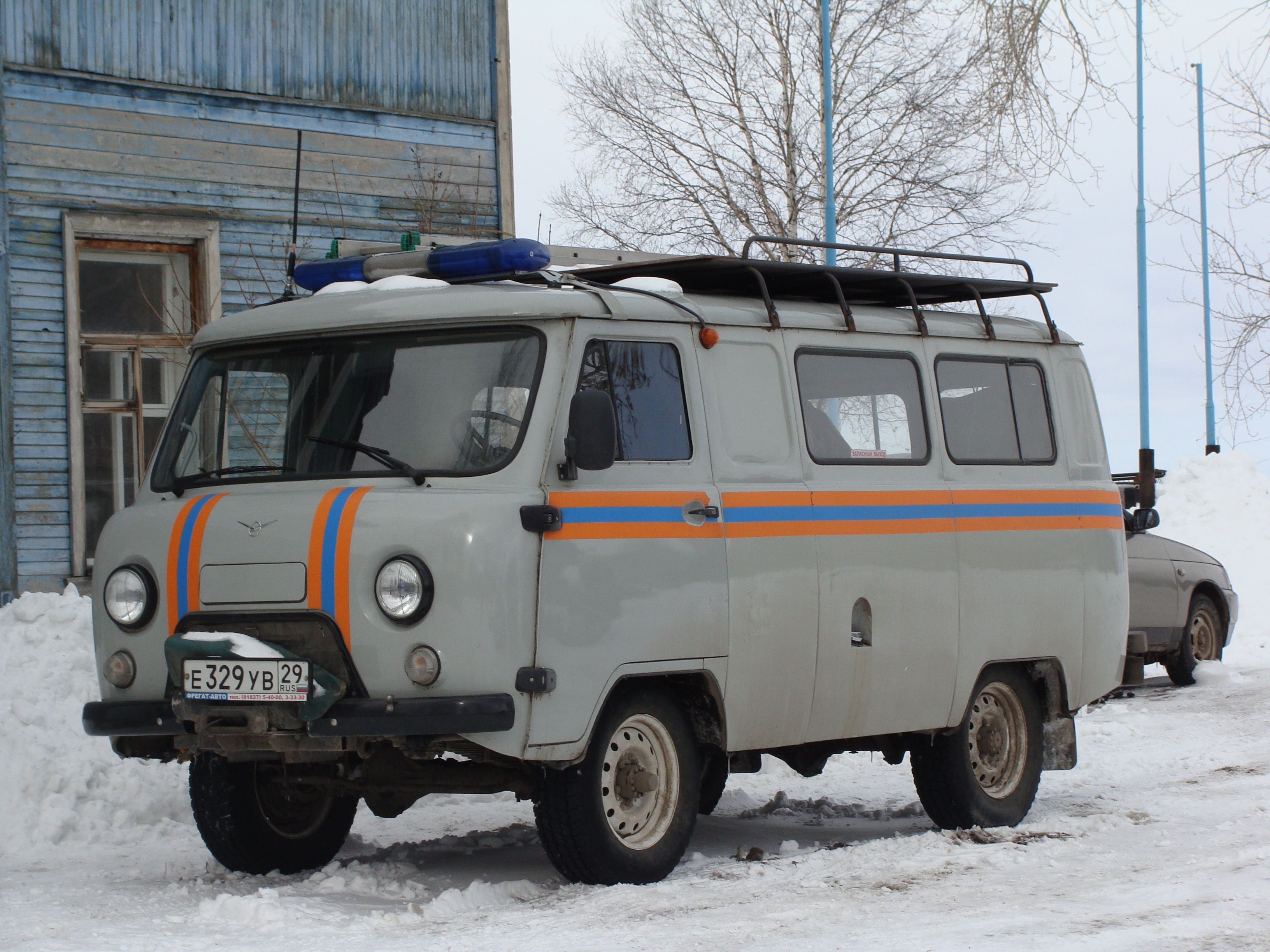 УАЗ 452 Котласская городская служба спасения